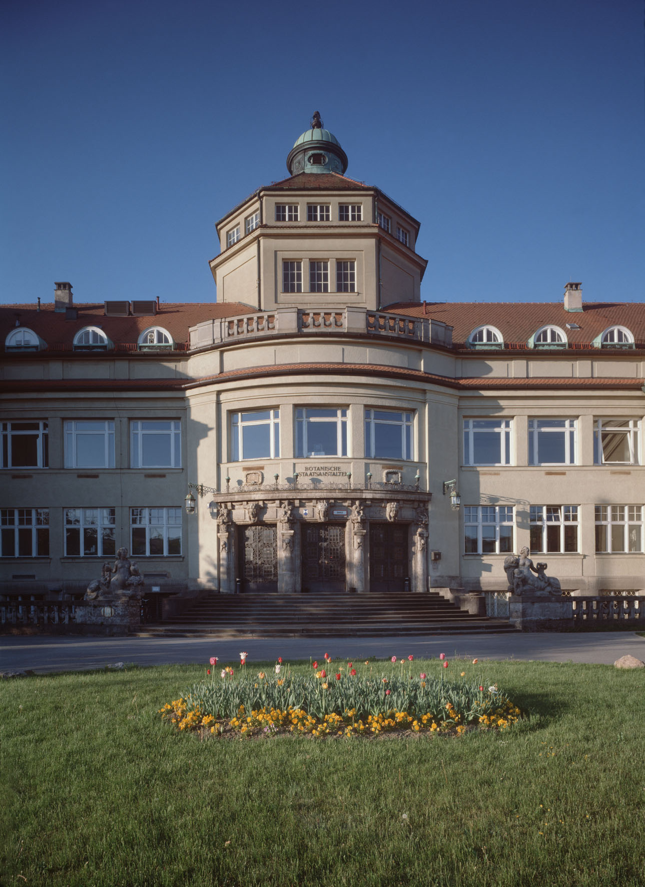 Botanisches Institut Menzingerstr67 anno2010 Nordseite